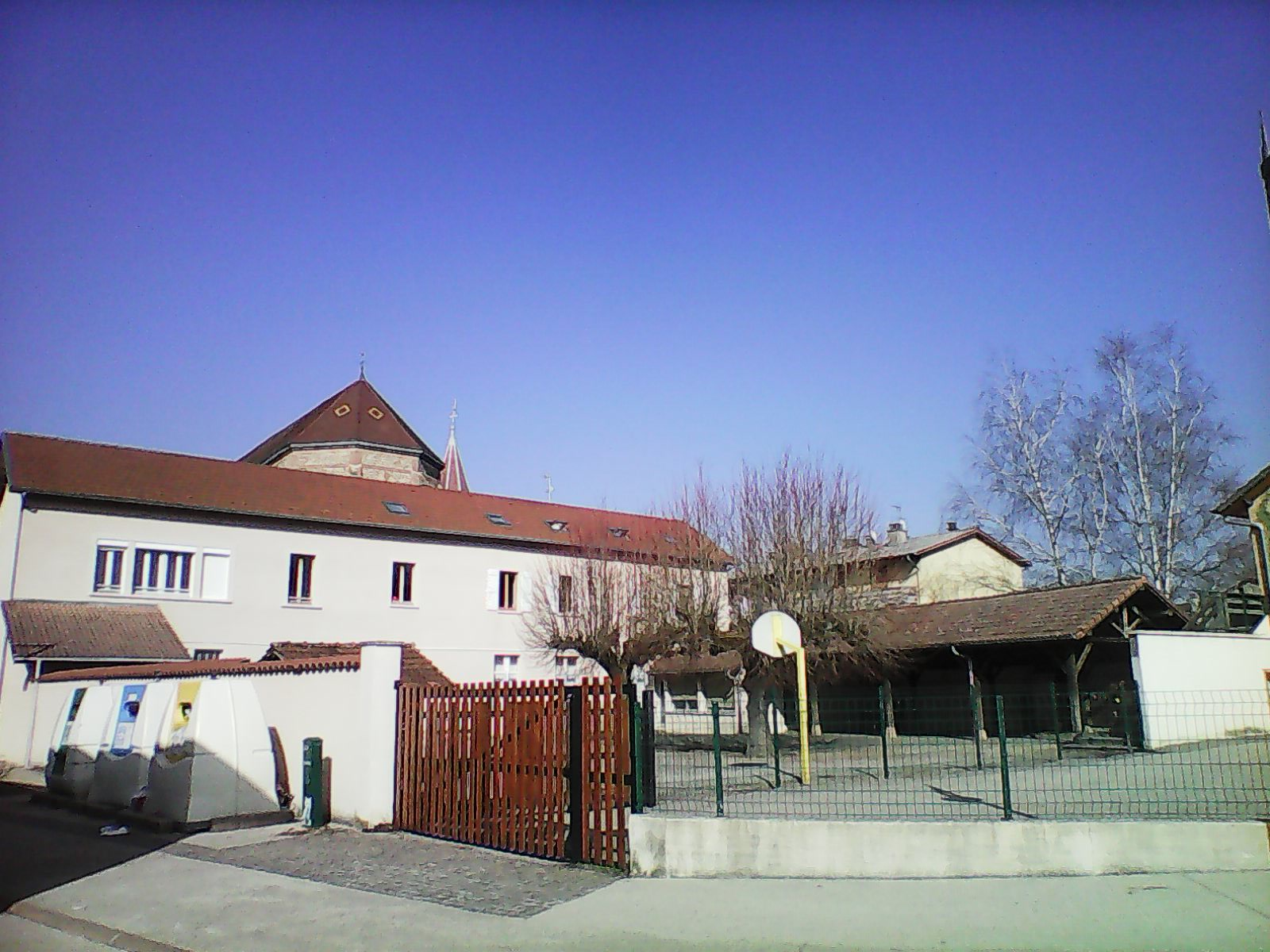 école du centre de Saint-Étienne-de-Saint-Geoirs